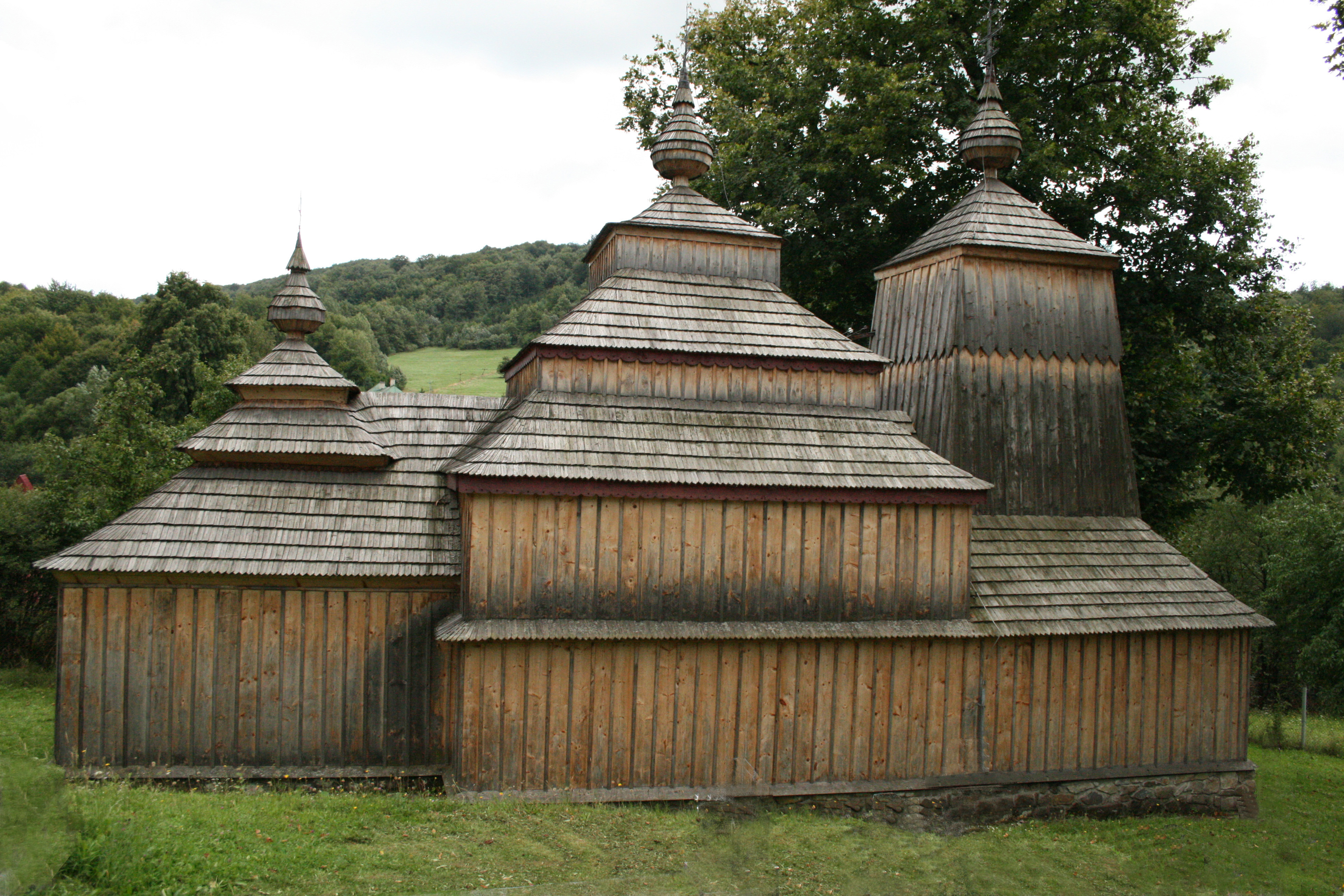 Cerkov svateho Michala archanjela, narodna kultúrna pamiatka, Príkra